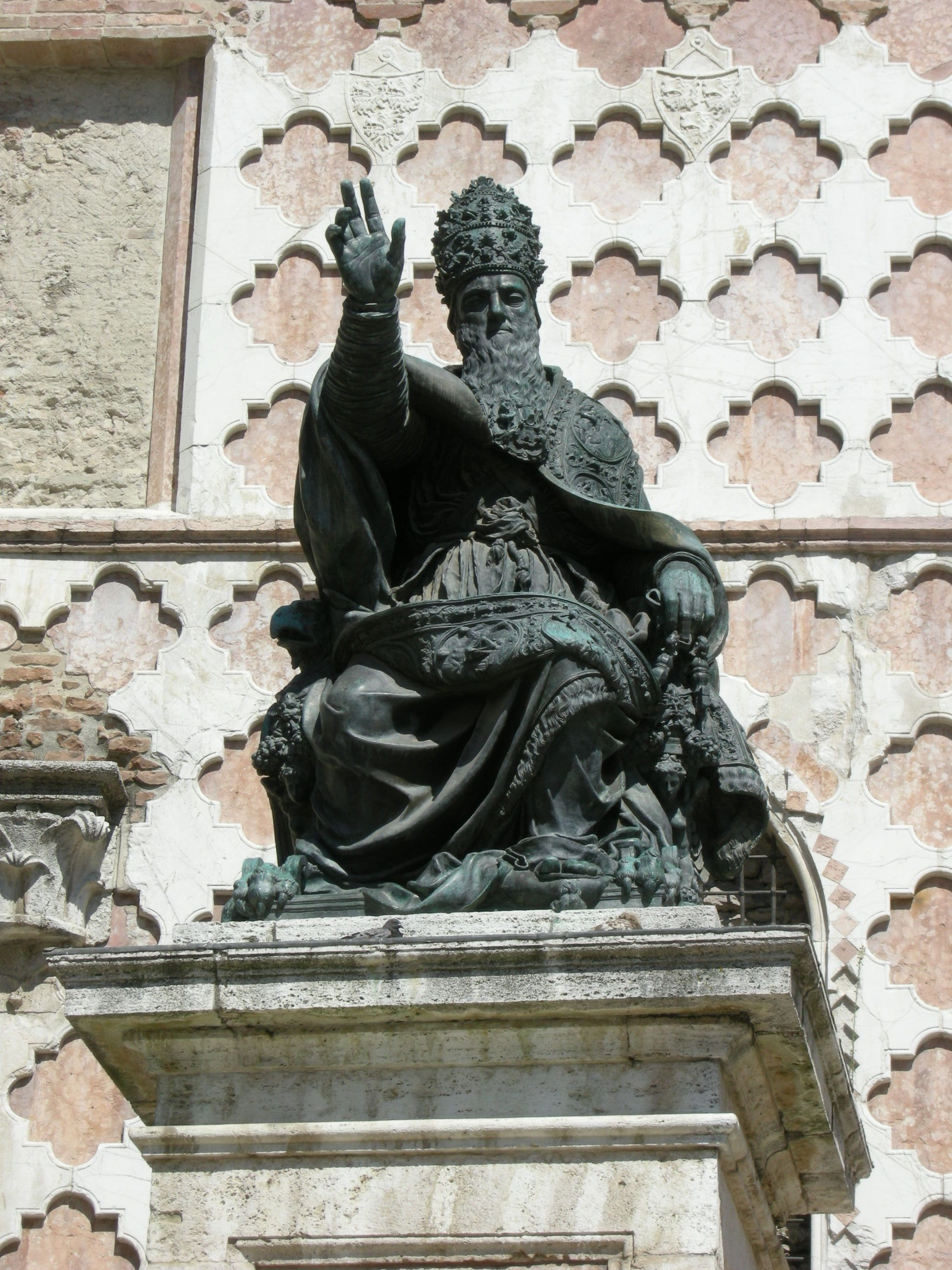 Perugia, duomo, statua di Giulio III di vincenzo danti